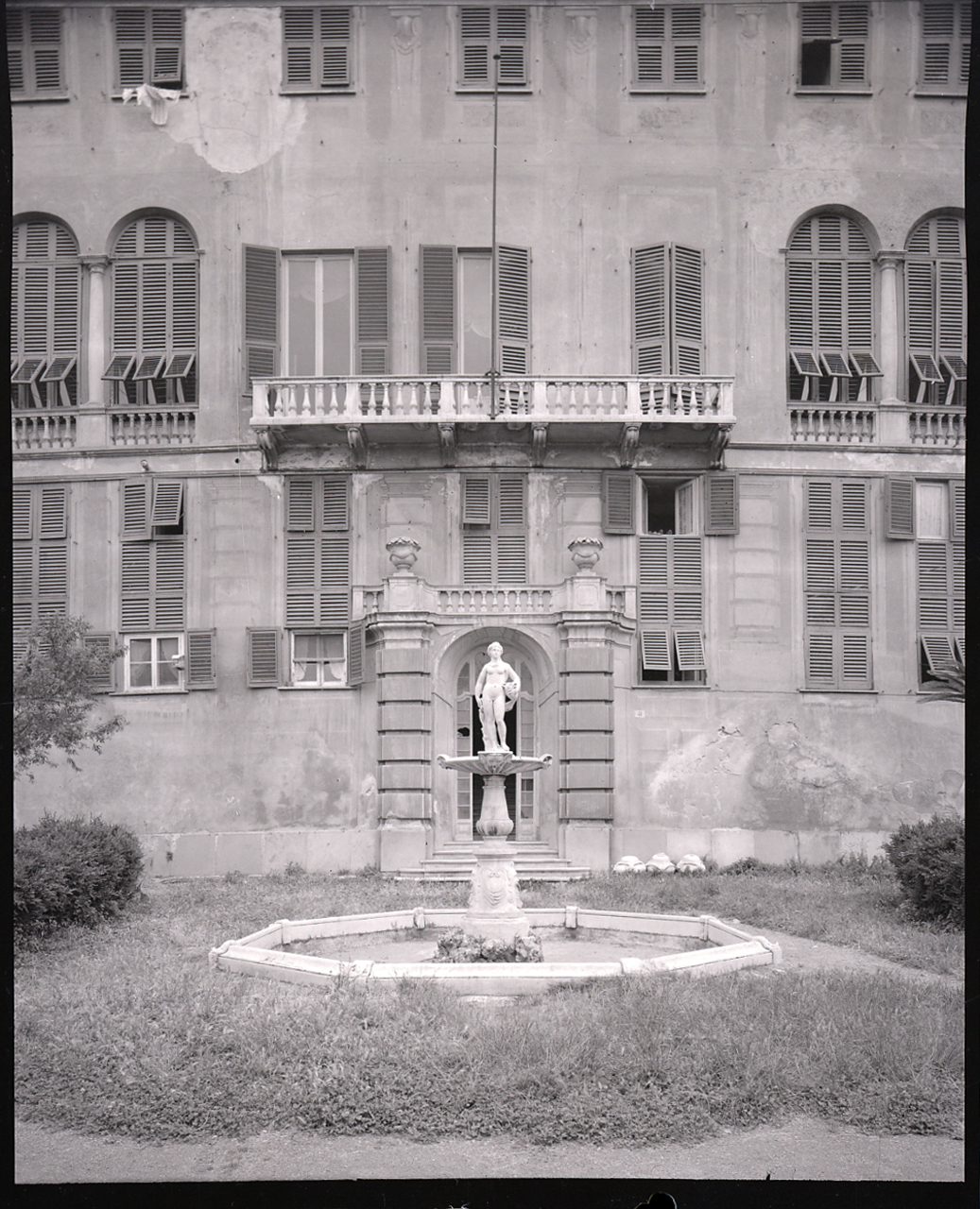 Servizio fotografico : Genova, 1964 / Paolo Monti. - Buste: 4, Fototipi: 4 : Negativo b/n, gelatina bromuro d'argento/ pellicola ; 10x12. - ((Serie costituita da 4 buste sciolte di negativi identificati con i nn.: 8169, 8170, 8171, 8373. - Il negativo identificato con il numero 46397 è stato realizzato per Zodiac. - Occasione: Documentazione per la pubblicazione: Italia Nostra (a cura di), "Le ville genovesi", catalogo della mostra, Genova 1962, Genova, Comune di Genova, 1967. - Fonte: Monografia di Italia Nostra (a cura di): Le ville genovesi, catalogo della mostra, Genova 1962, Genova, Comune di Genova (1967). - Fonte: Lettera di Paolo Monti: I. Carteggi/ Genova - Enrico (1963-1966), presso Archivio Paolo Monti. Camicia con documenti dattiloscritti e manoscritti vari relativi al lavoro eseguito per Italia Nostra: preventivi, lettere, inventari. - Fonte: Agenda di Paolo Monti: R 1 - Monti/ 1 aprile 1963 - 6 giugno 1964/ 6000-8193 (1963-1964), presso Archivio Paolo Monti